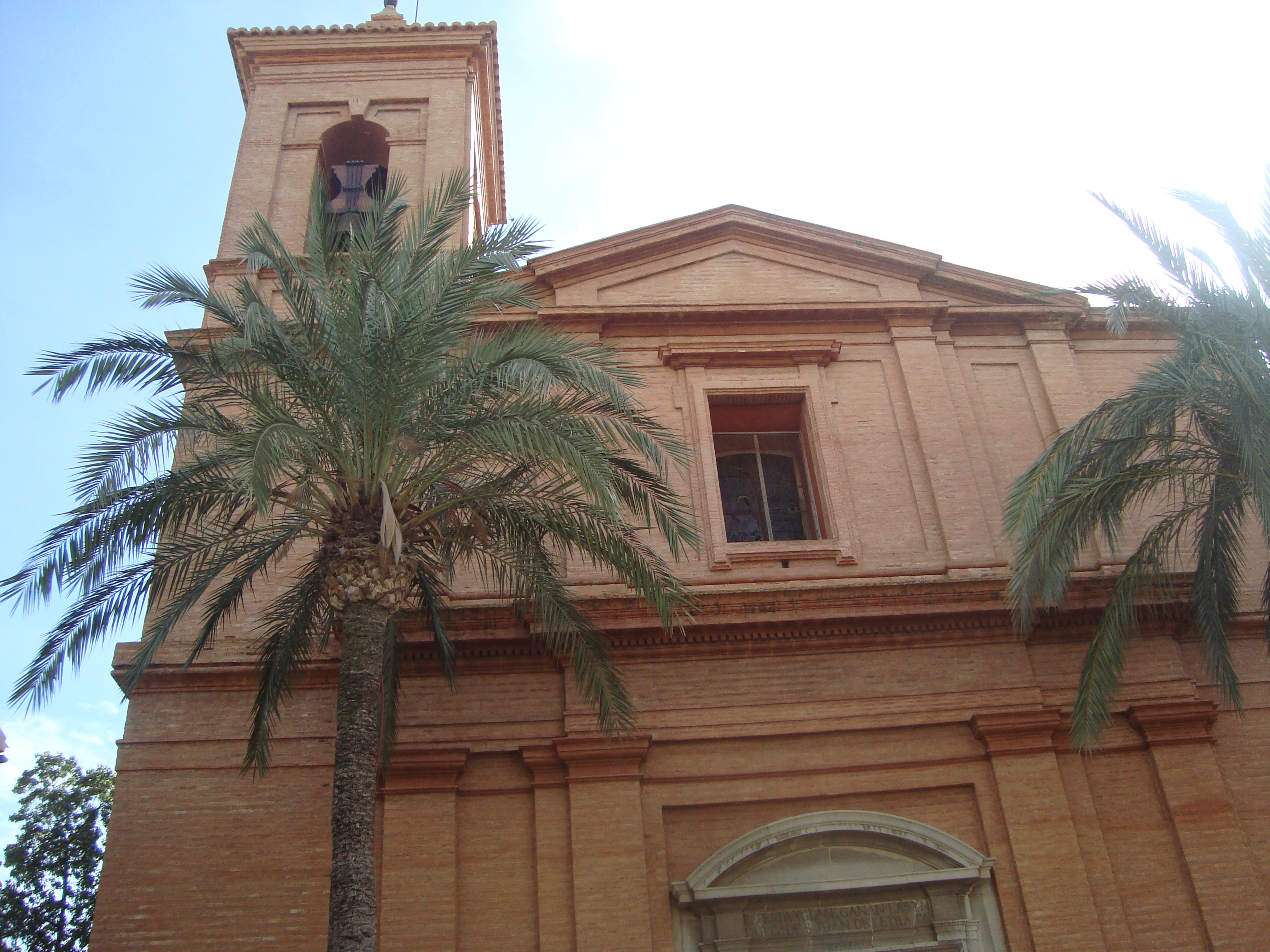 La Iglesia Parroquial de Santo Tomás de Villanueva es edificio religioso de Benicássim. Fue construida en el siglo XVIII, en estilo neoclásico (1769-1781).